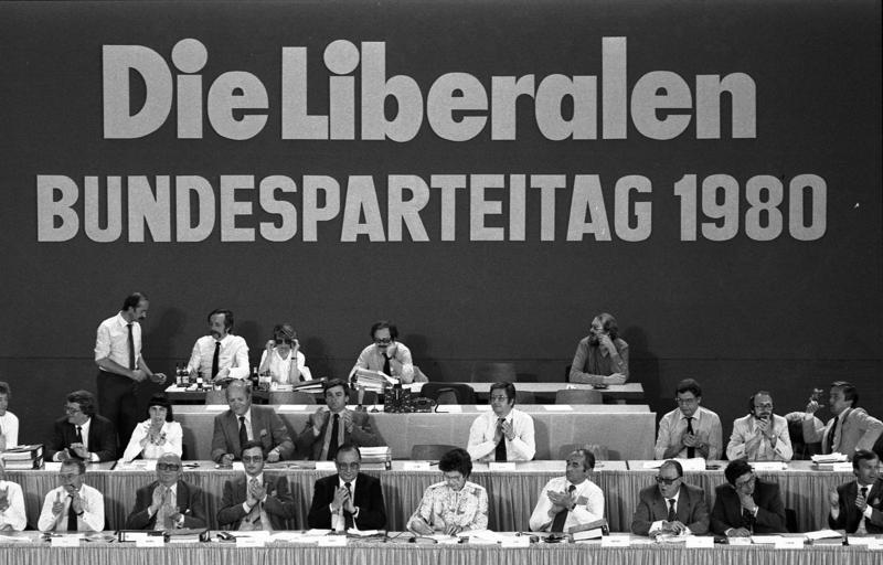 Außerordentlicher Bundesparteitag der FDP in Freiburg.